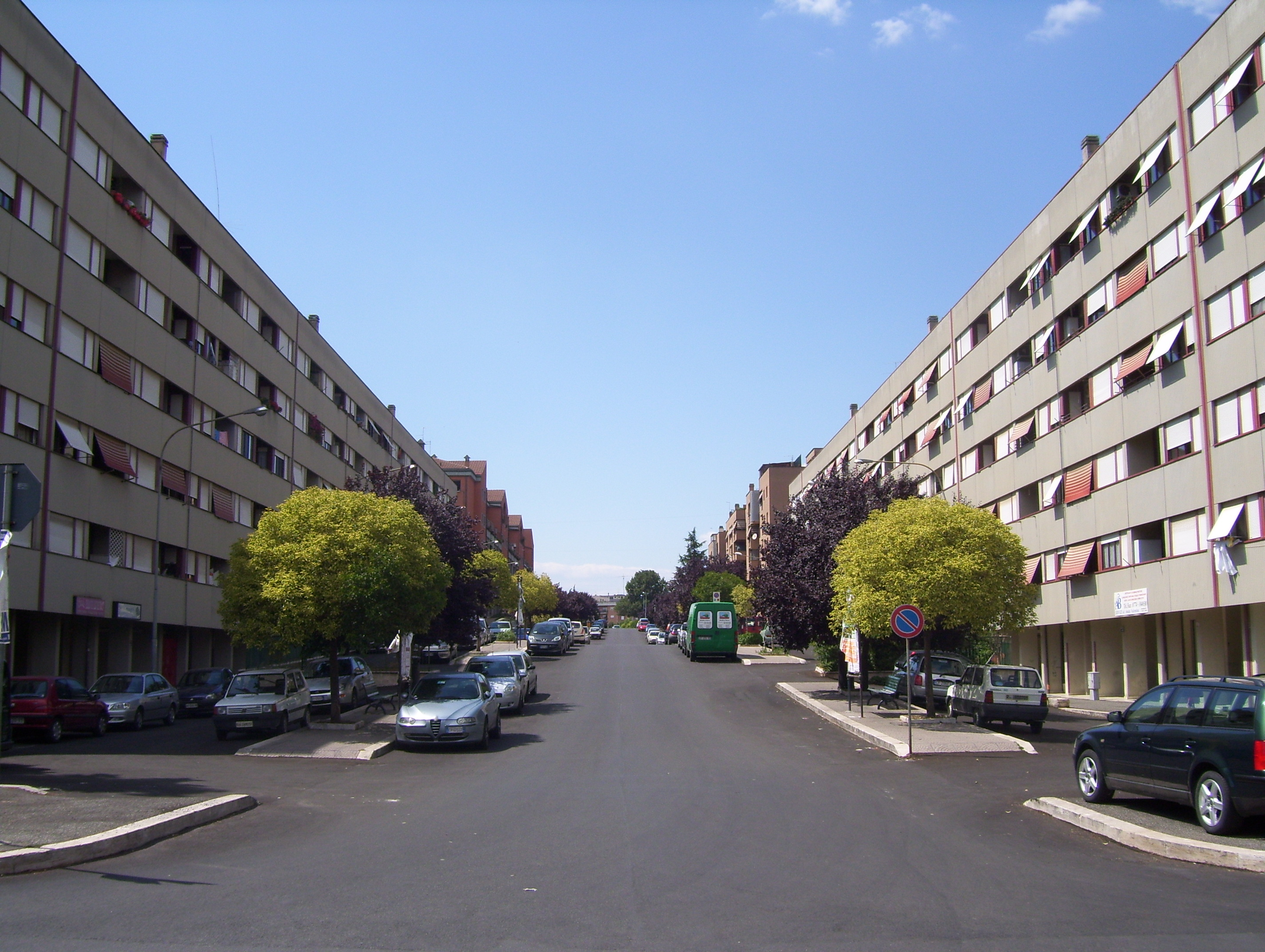 Colle Fiorito - Guidonia Montecelio, Provincia di Roma, Italia.